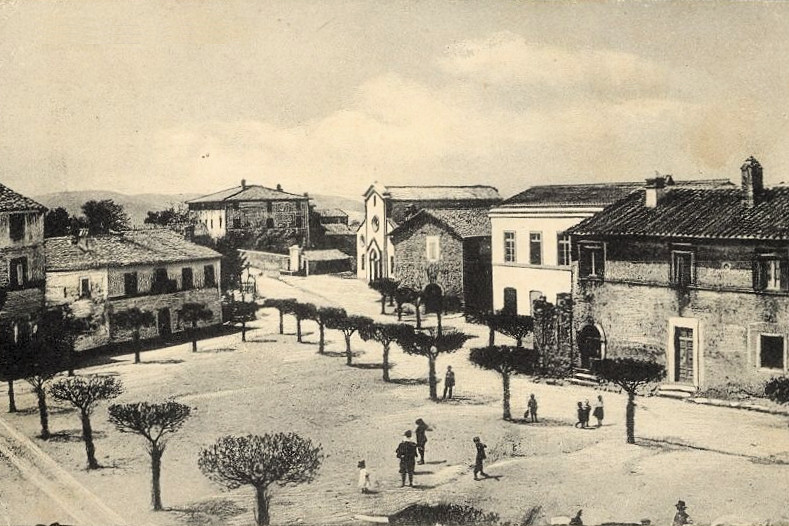 Piazza di Montevirginio agli inizi del secolo scorso.